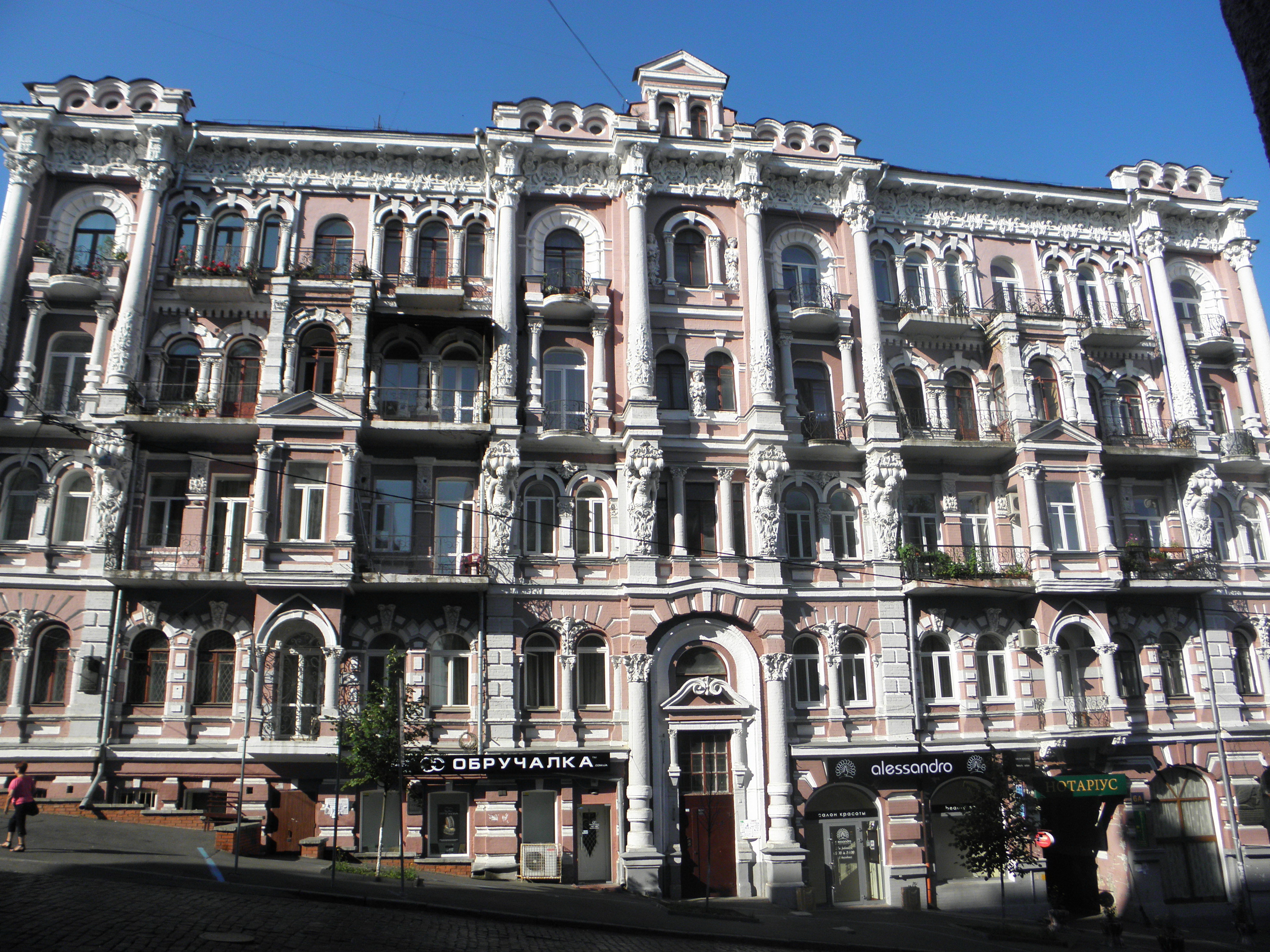 Будинок прибутковий, в якому проживали М. Горький, письменник, жив і працював О. О. Ковальов, скульптор, Київ, Лютеранська вул., 6